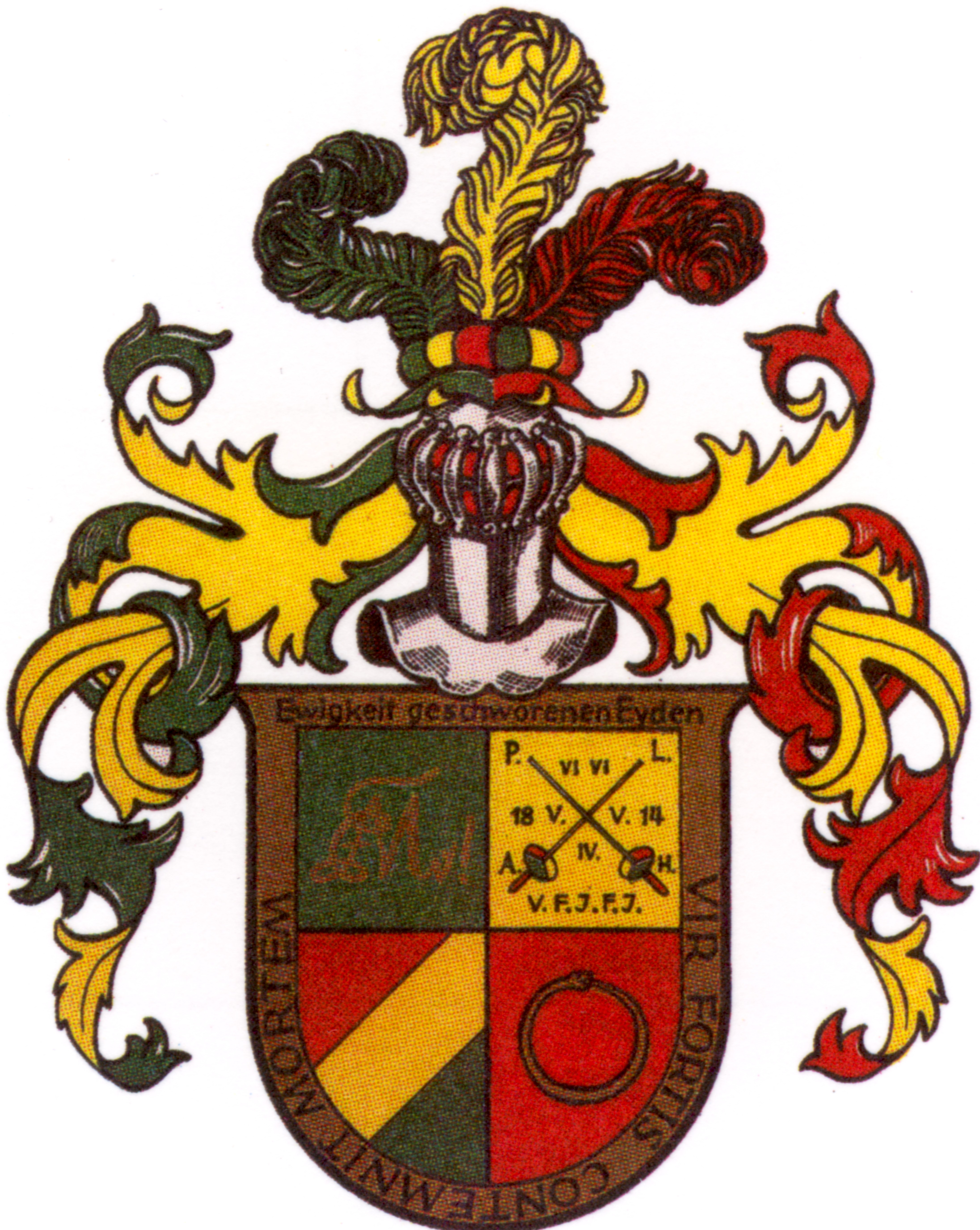 Studentenwappen des Corps Moenania Würzburg